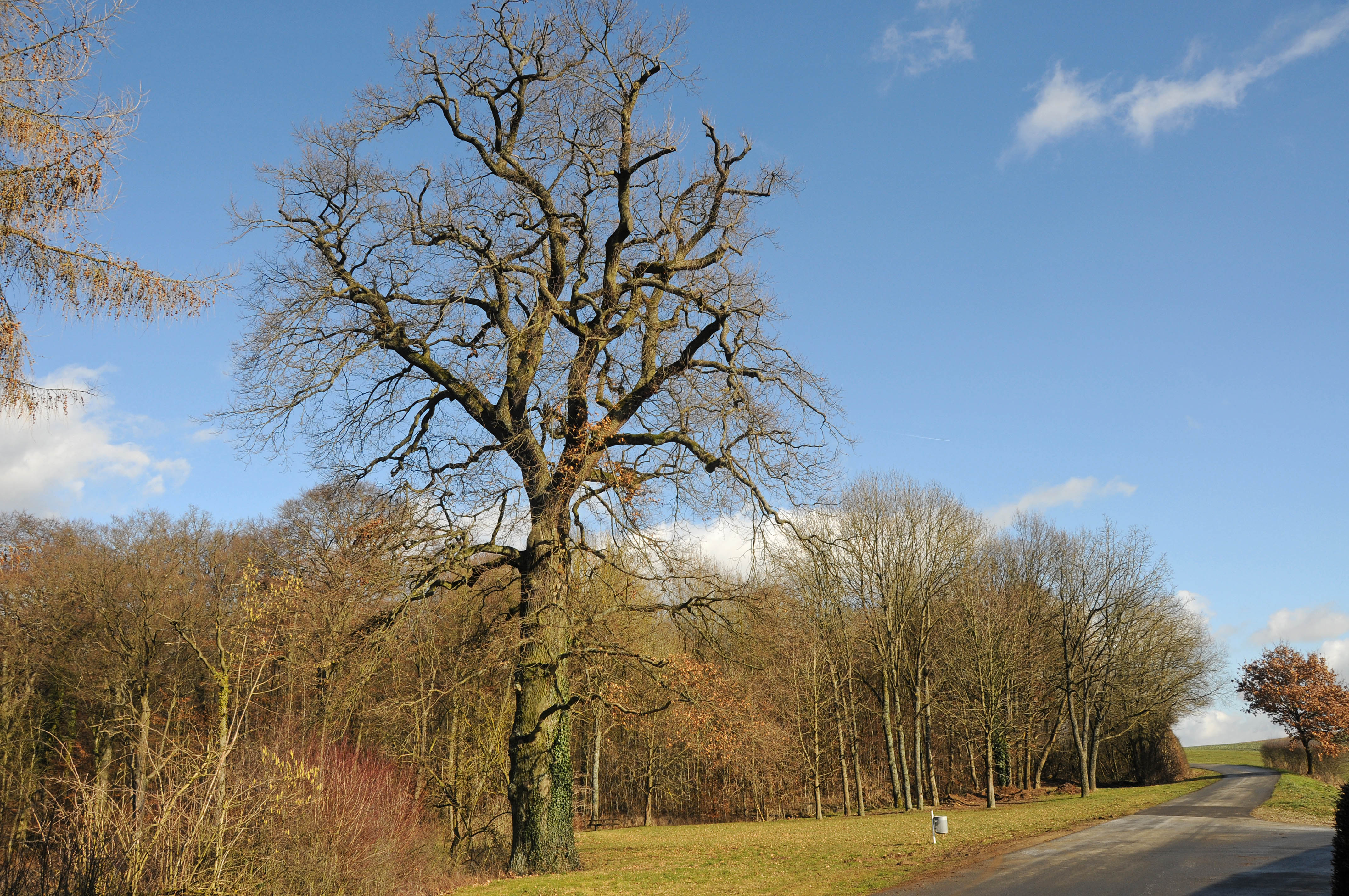 Eech zu Mutfert.